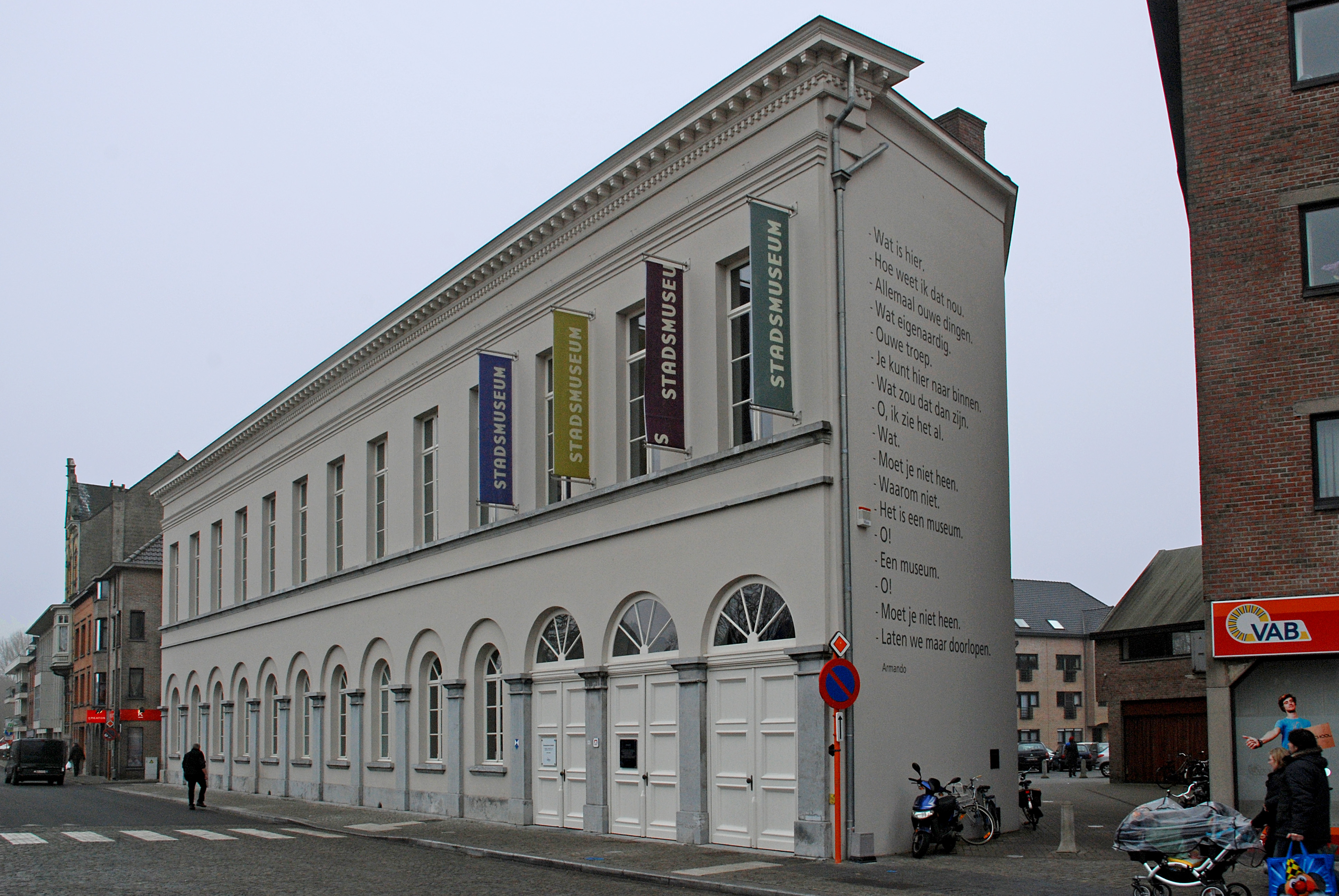 Lokeren onroerend erfgoed ID 17812